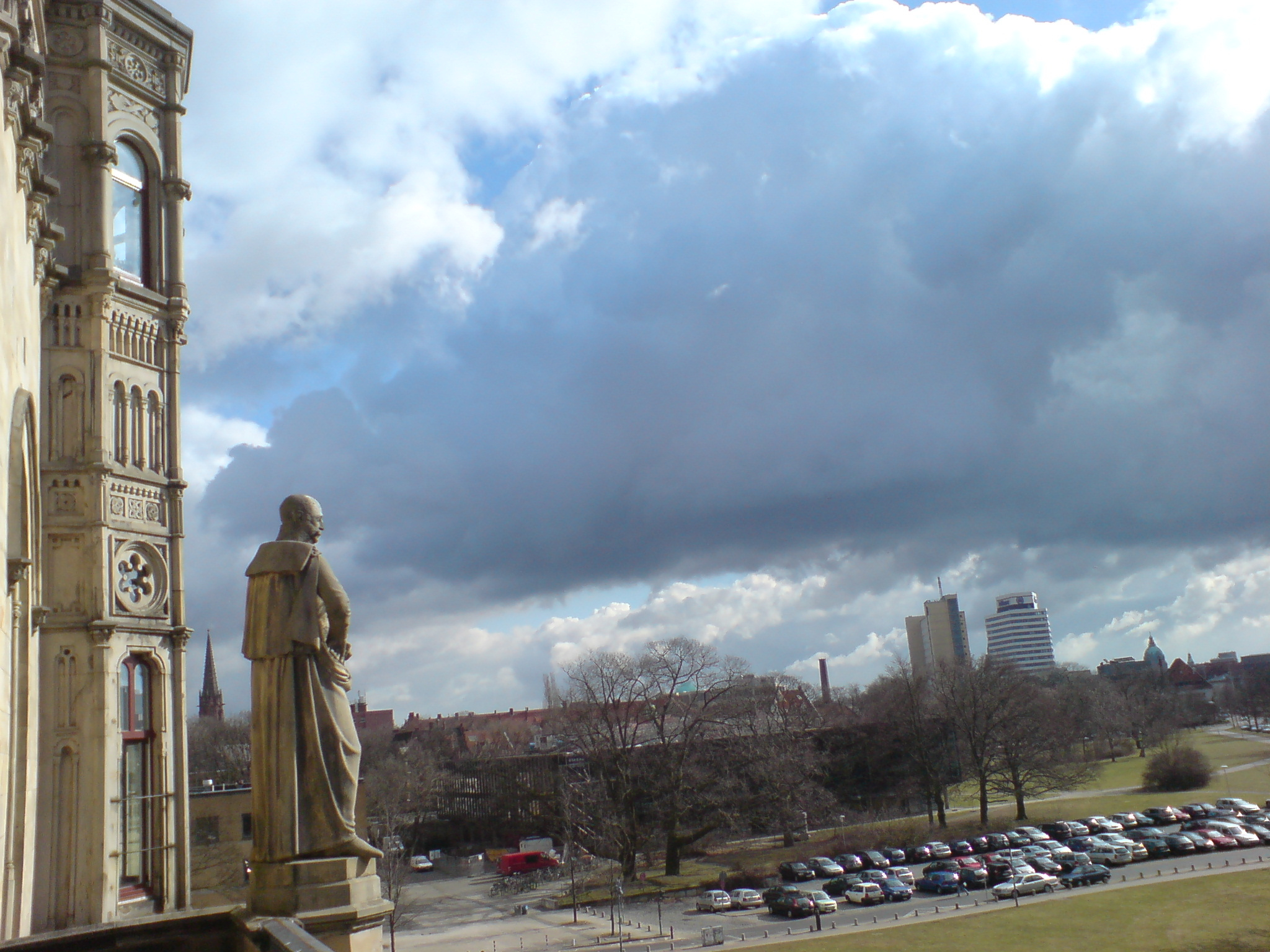 Blick vom Balkon über dem Haupteingang des Welfenschlosses (heute Leibniz Universität Hannover). Der Turm der als Residenzkirche geplanten Christuskirche ist unten links zwischen der östlichsten Sandsteinfigur und dem wie ein Turm wirkenden Erker zu erkennen. Auf dem Gelände zwischen Schloss und Kirche befand sich das wüst gewordene Dorf Puttensen, an das heute nur noch der Strassenname "Am Puttenser Felde" erinnert. In der Bildmitte eine weitere Bibliothek der Leibniz Universität Hannover, ganz rechts die der ehemalige Verwaltungssitz der Continental AG und das Allianz-Hochhaus am Königsworther Platz, dahinter das neue Rathaus von 1914, das manche Touristen mit "The Welfenschloss" verwechseln.